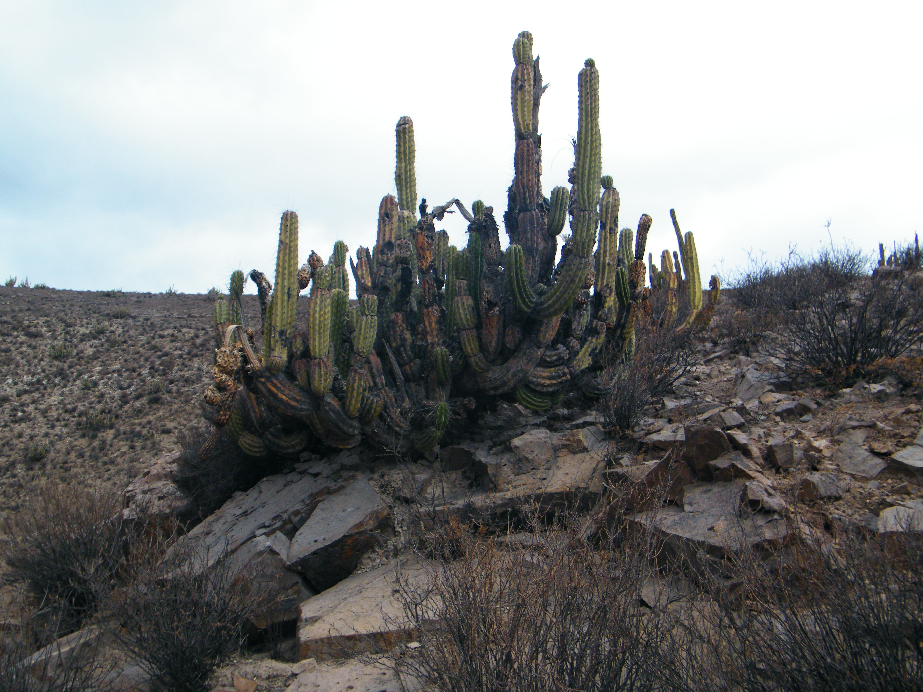 variedades de cactus